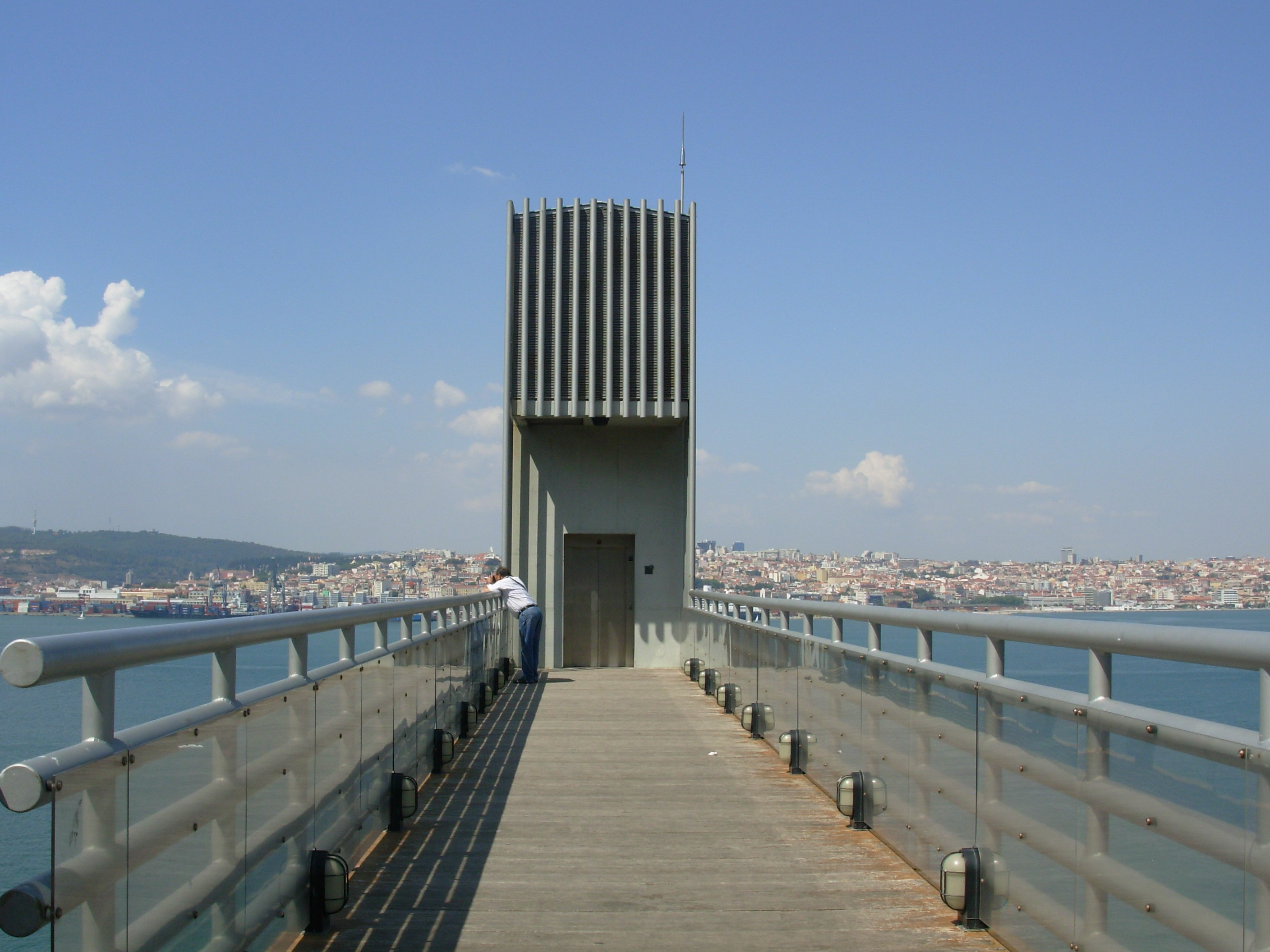 Elevador da Boca do Vento